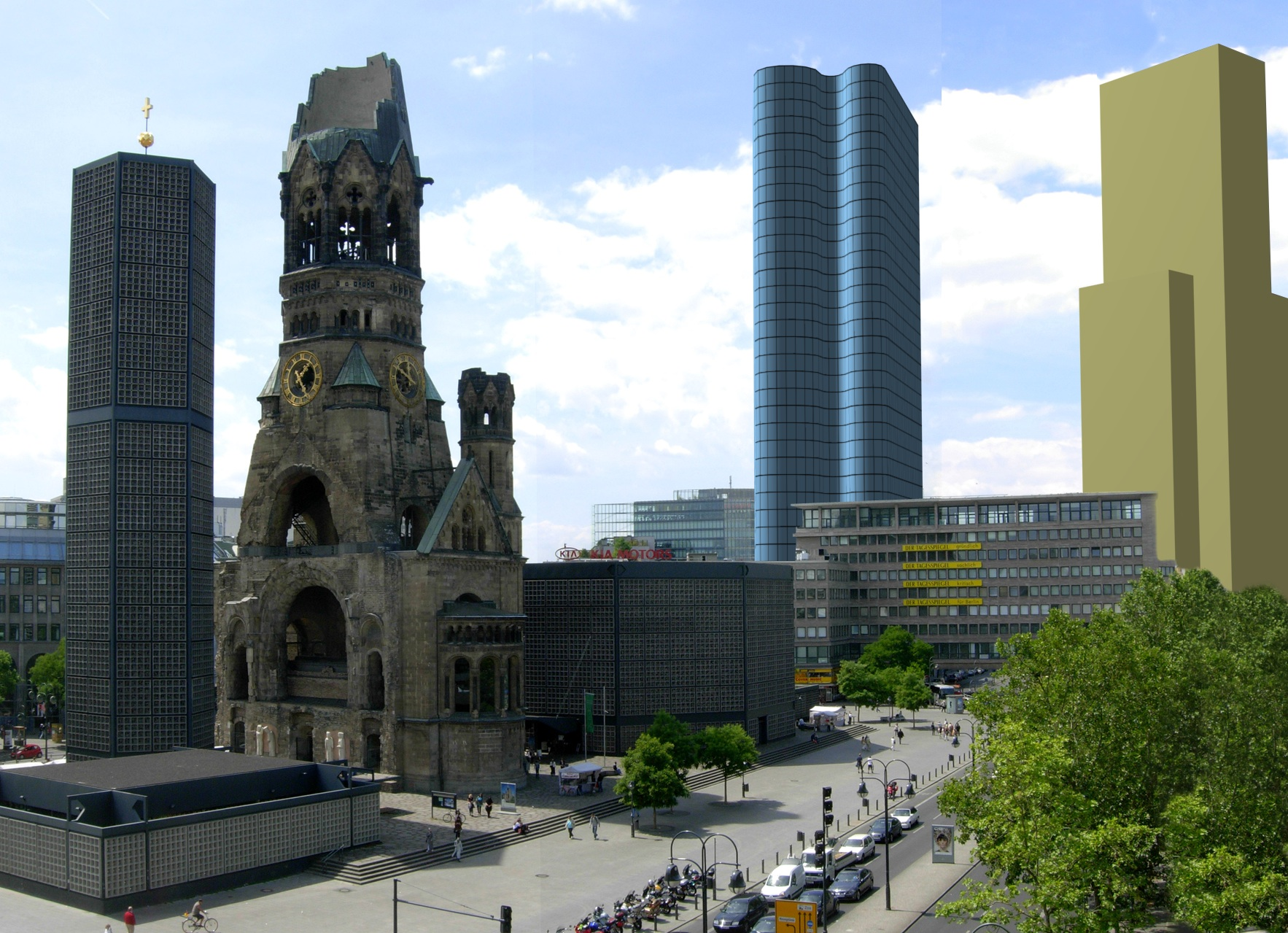 So könnten die beiden geplanten Hochhäuser hinterm Breitscheidplatz in Berlin aussehen, wenn man das Schimmelpfenghaus als Einfassung des Platzes bestehen lassen würde